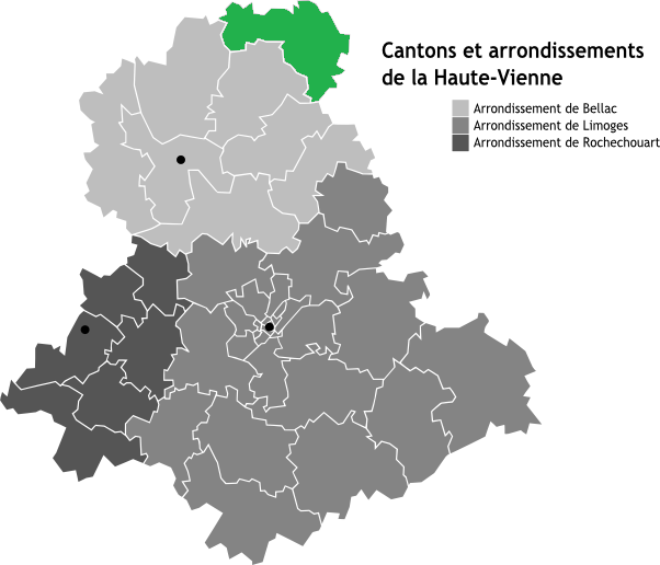 Canton de Saint-Sulpice-les-Feuilles, Limousin, France en Carte des arrondissements de la Haute-Vienne